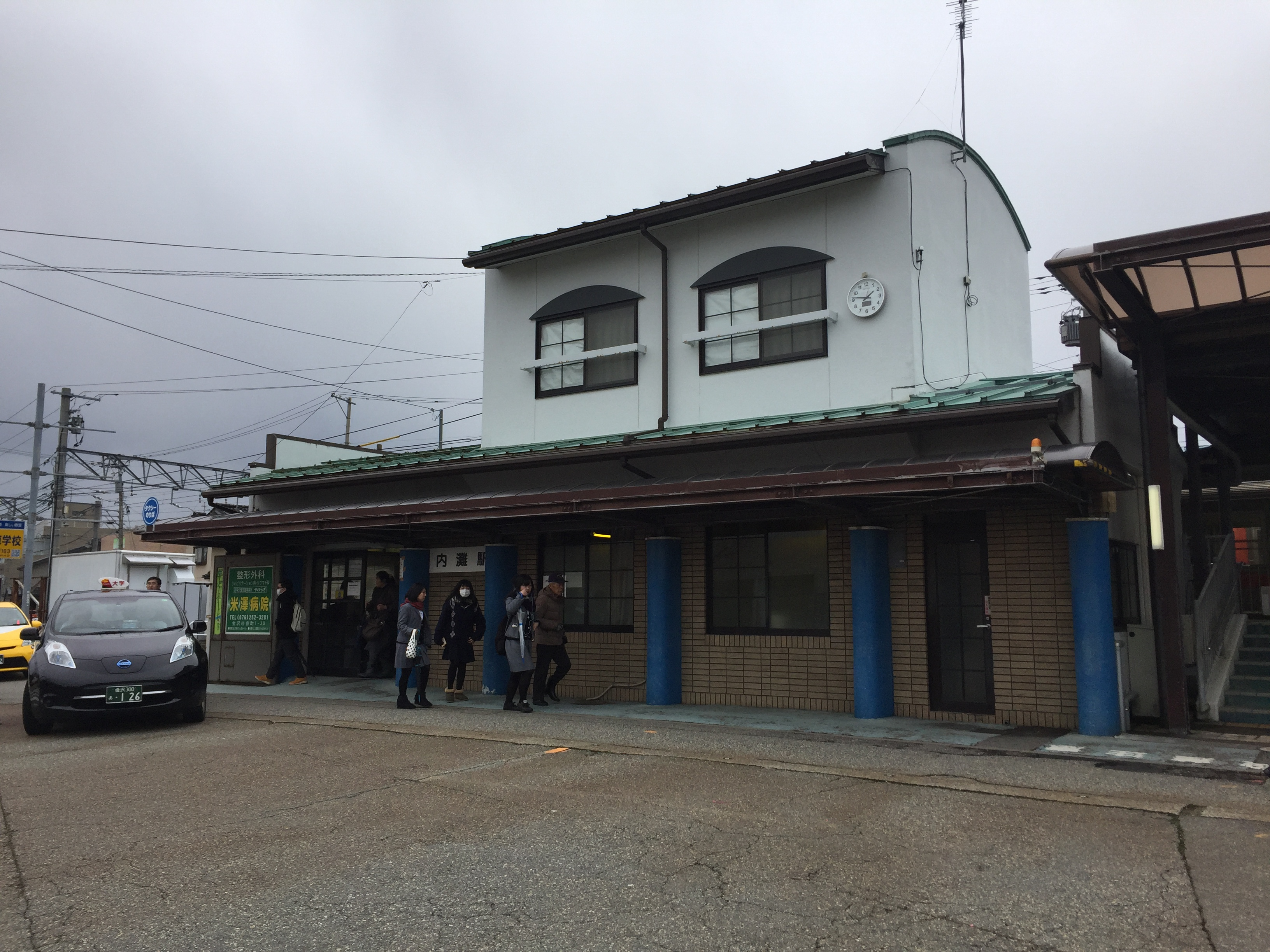 北陸鉄道 浅野川線